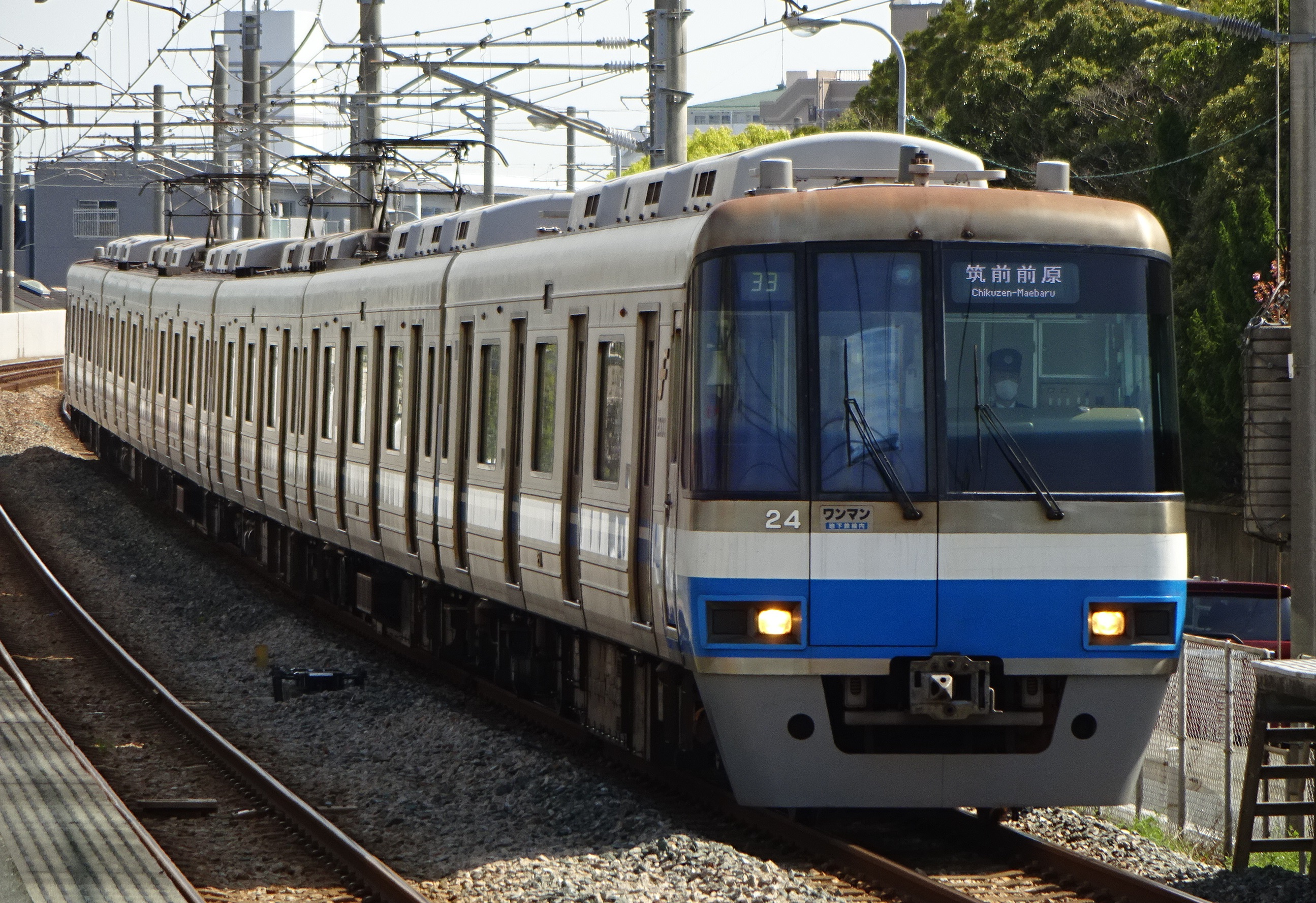 福岡市交通局2000系 第24編成 下山門駅にて撮影（2016年4月9日）